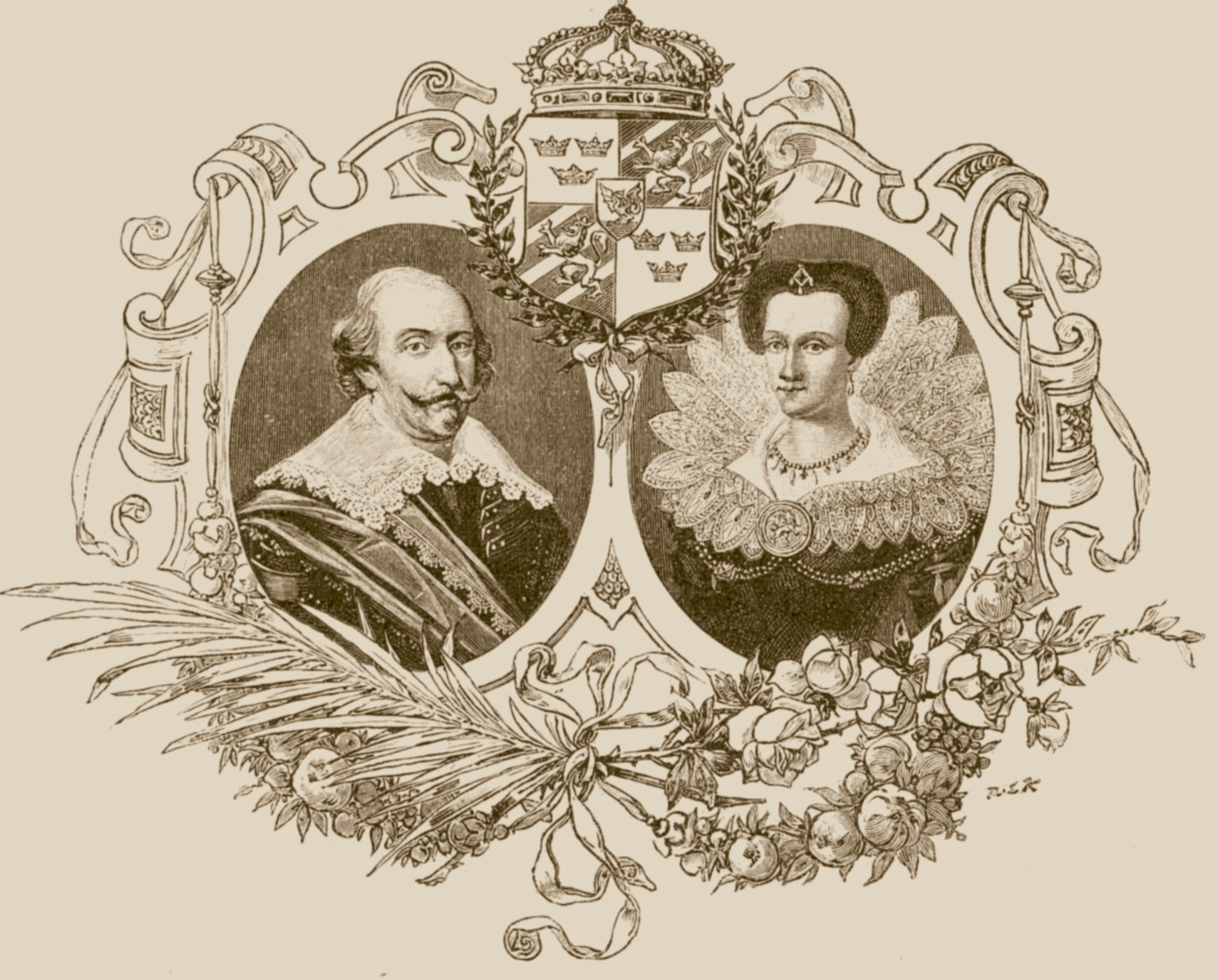 Christine von Holstein-Gottorp und Karl IX. von Schweden (Charles IX. from Sweden), die Eltern von König Gustav II. Adolf von Schweden (the parents of king Gustav II. Adolph from Sweden)